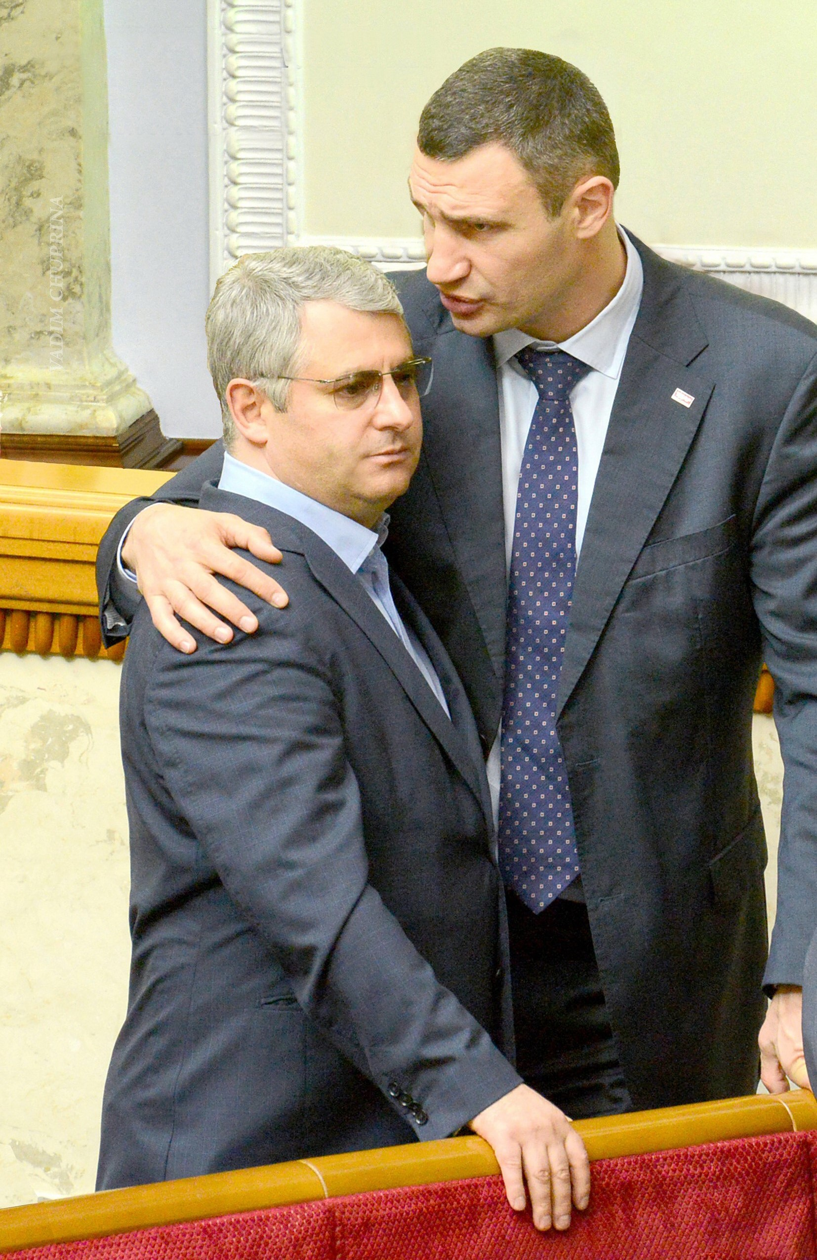 Романюк Роман и Кличко Виталий. ВЕРХОВНАЯ РАДА УКРАИНИ 2013 , фото Вадим Чуприна